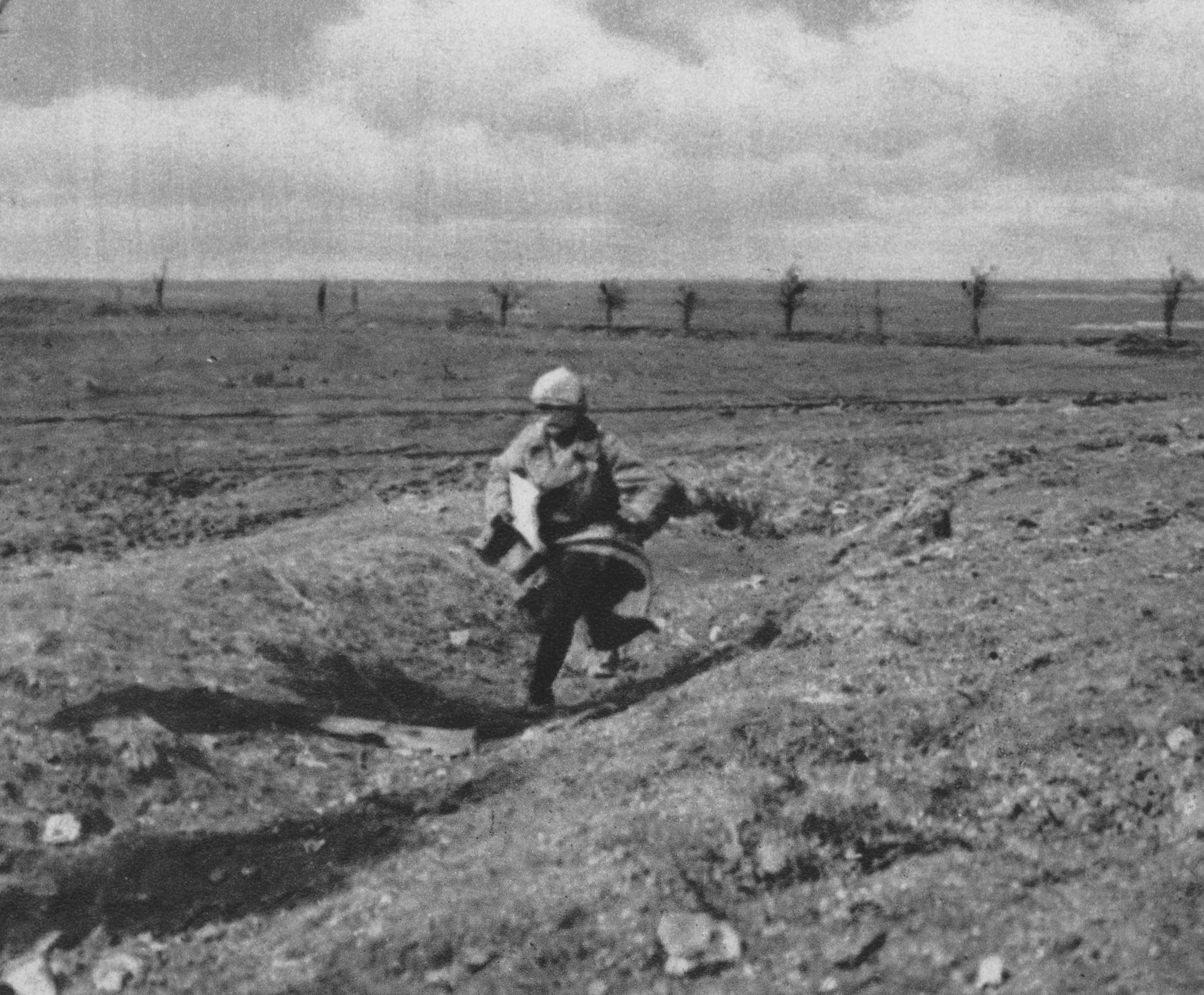 Meldegänger überbringen eine Weisung des Brigadekommandeurs, im Abschnitt von Cléry, 24. September 1916.